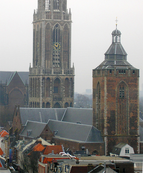 Utrecht, Buurkerk en daarachter Domtoren en -kerk